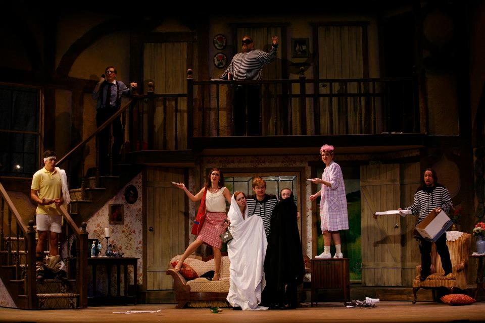 Noises Off